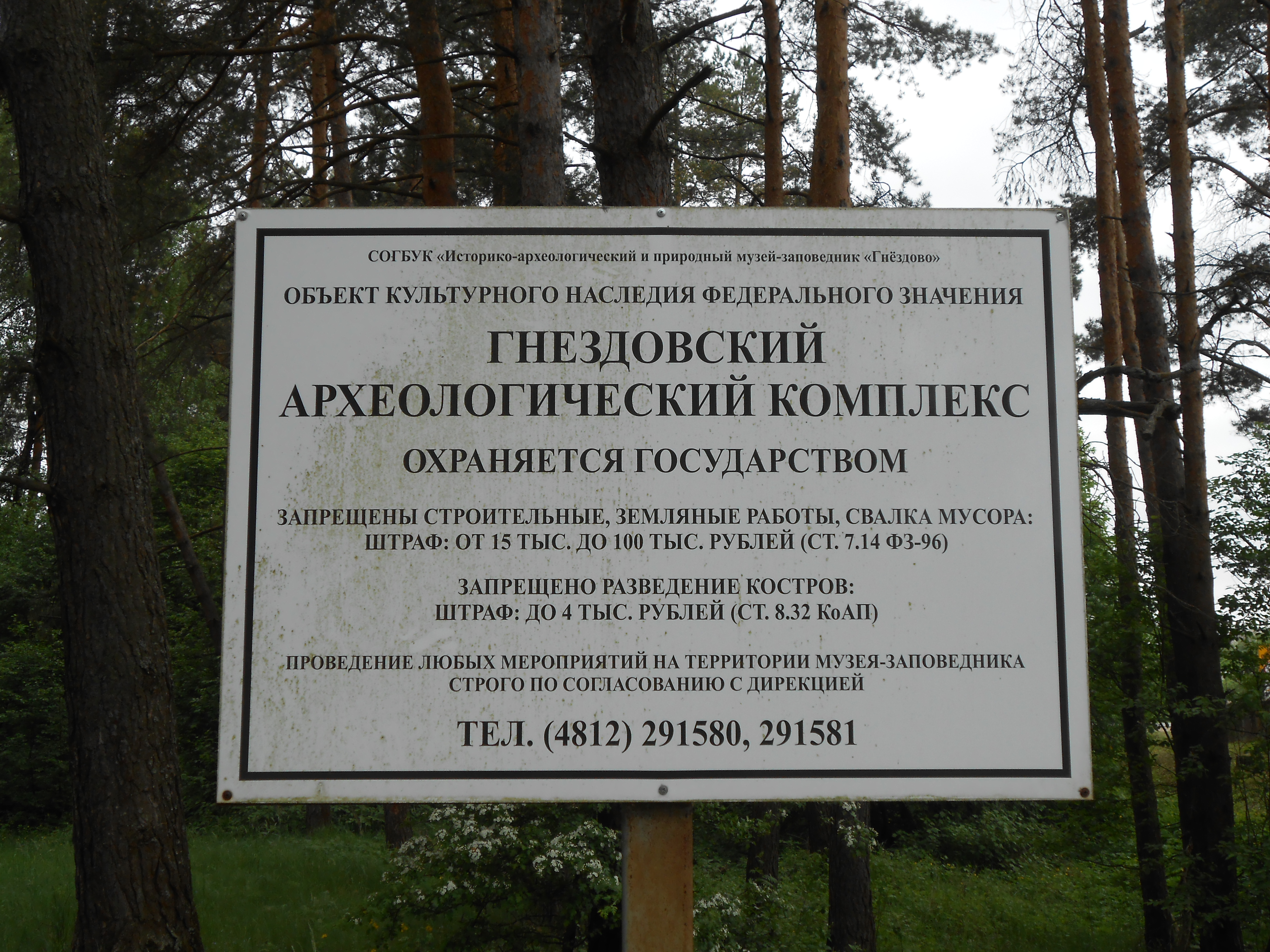 Гнёздовский археологический комплекс.